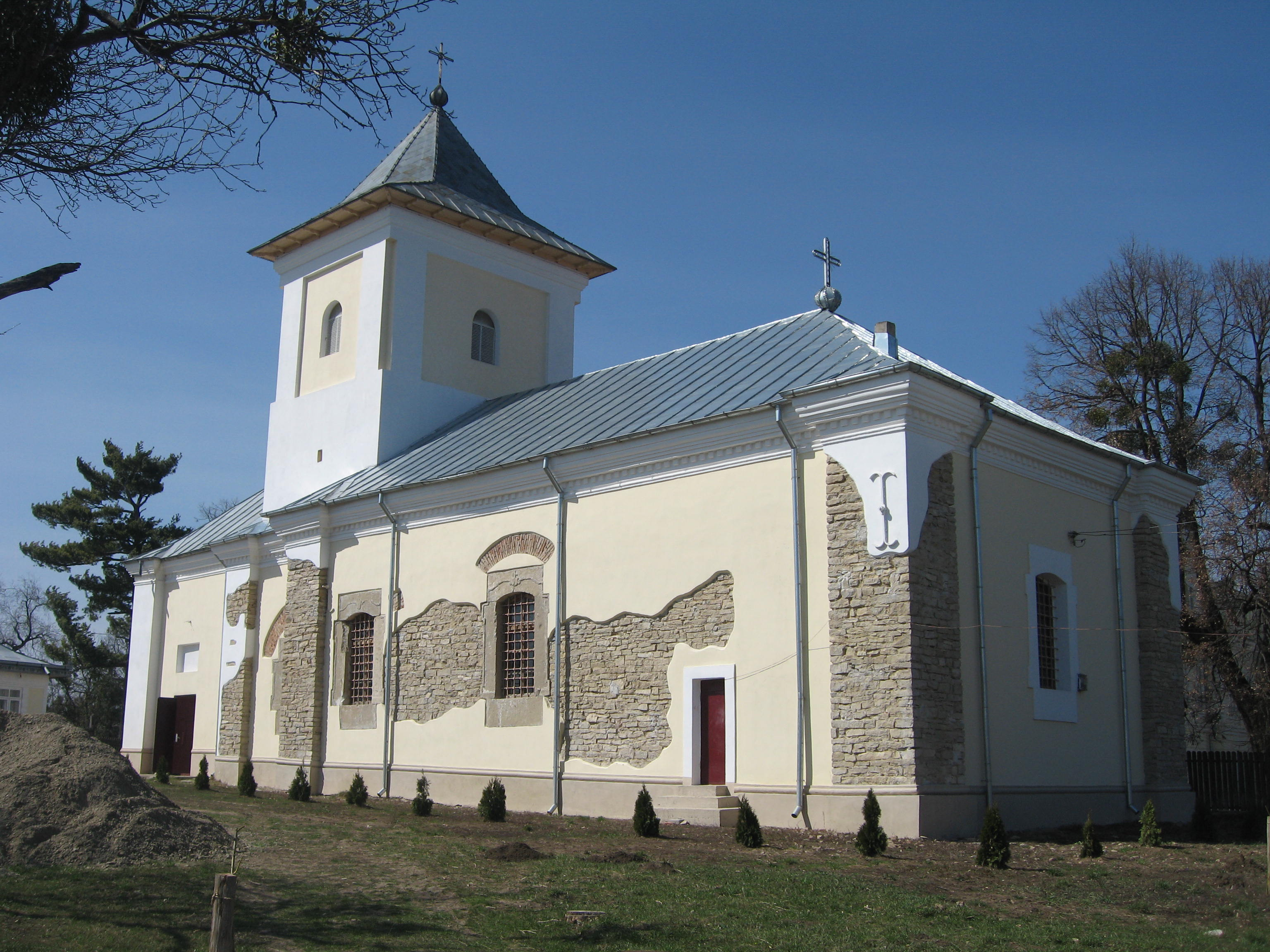 Biserica Sf. Voievozi din Popești, jud. Iași, România